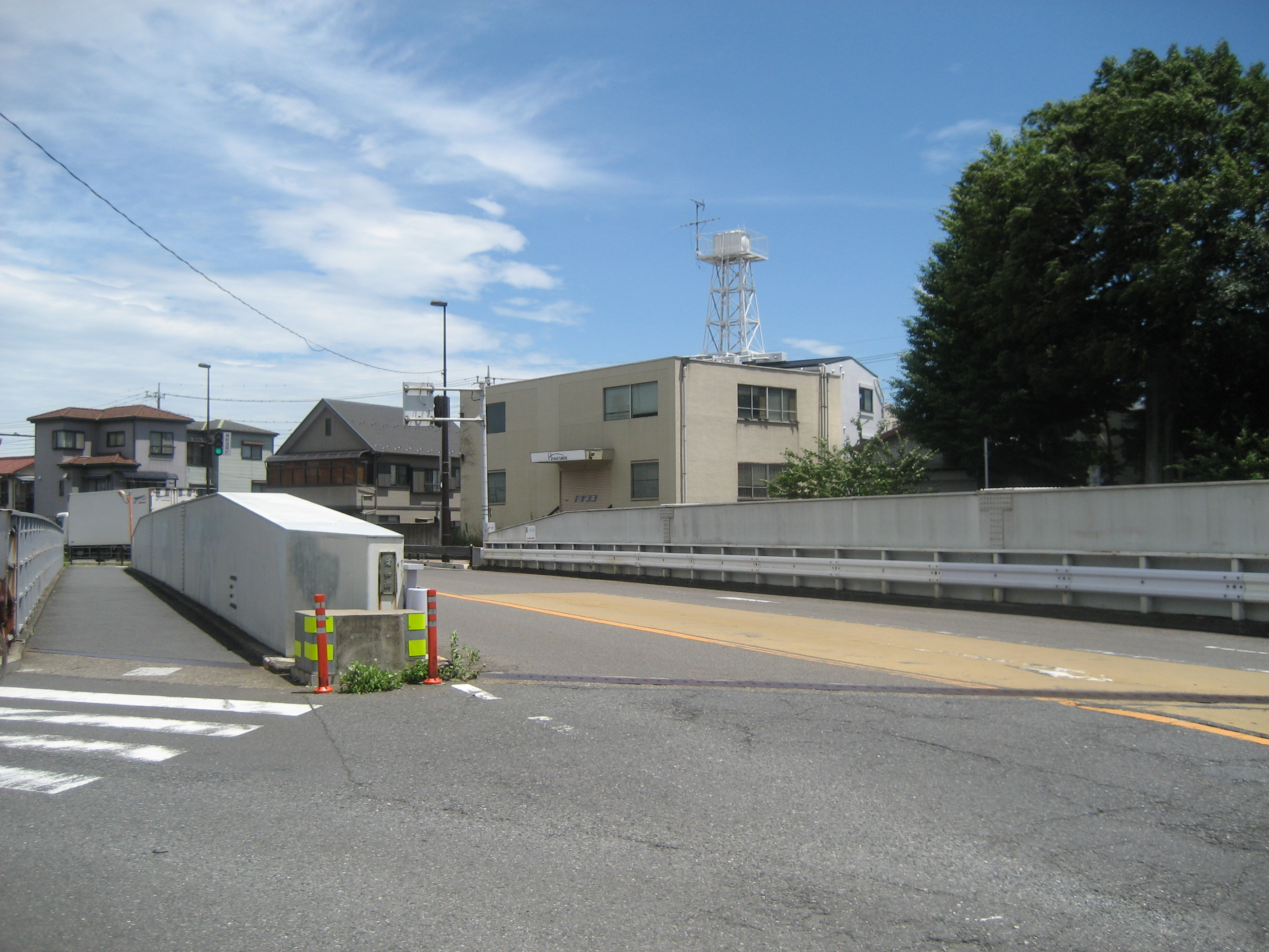 埼玉県道65号線浦和区浦和橋（浦和駅側から撮影）